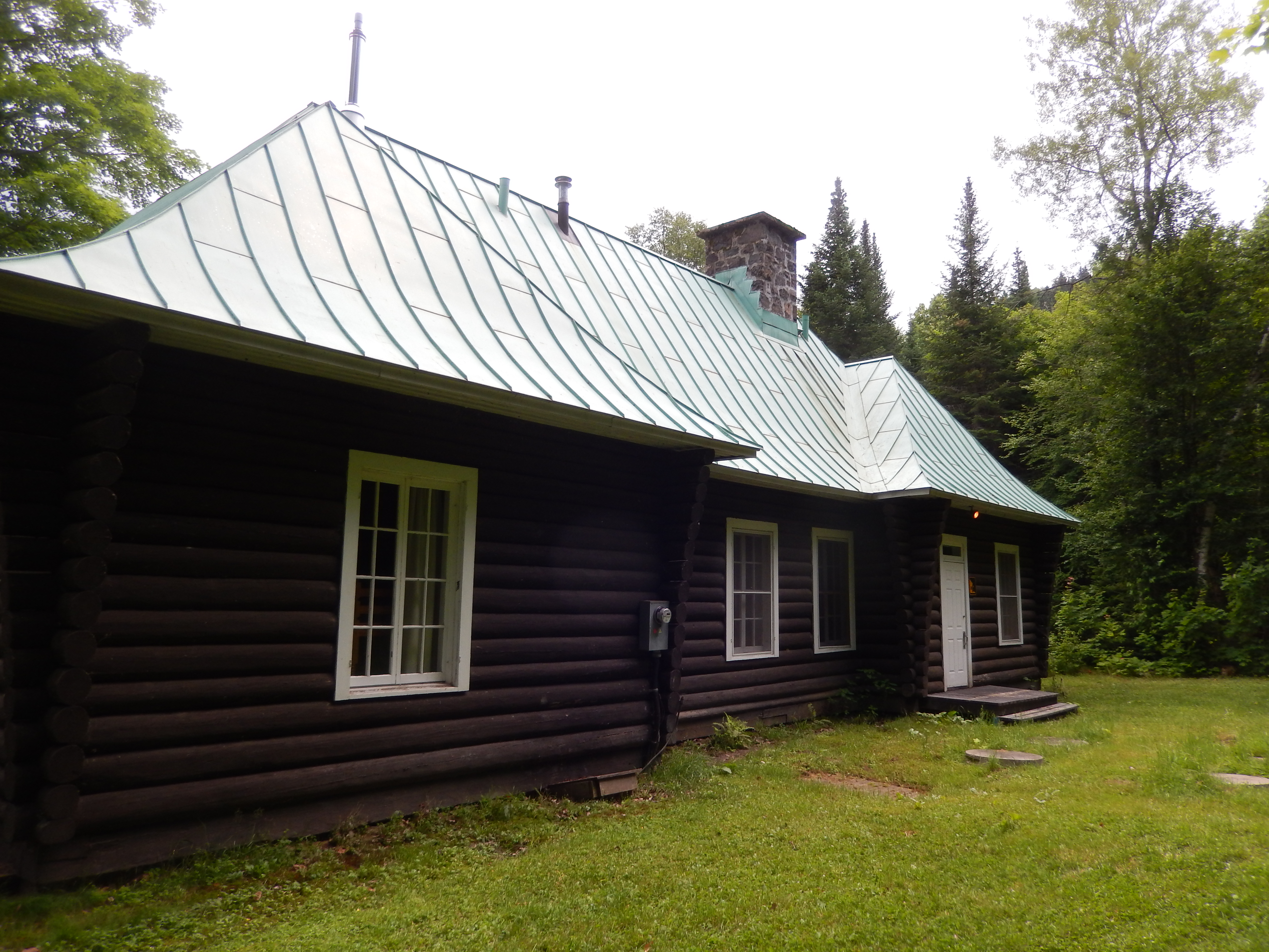 Maison Andrew en juillet 2017.